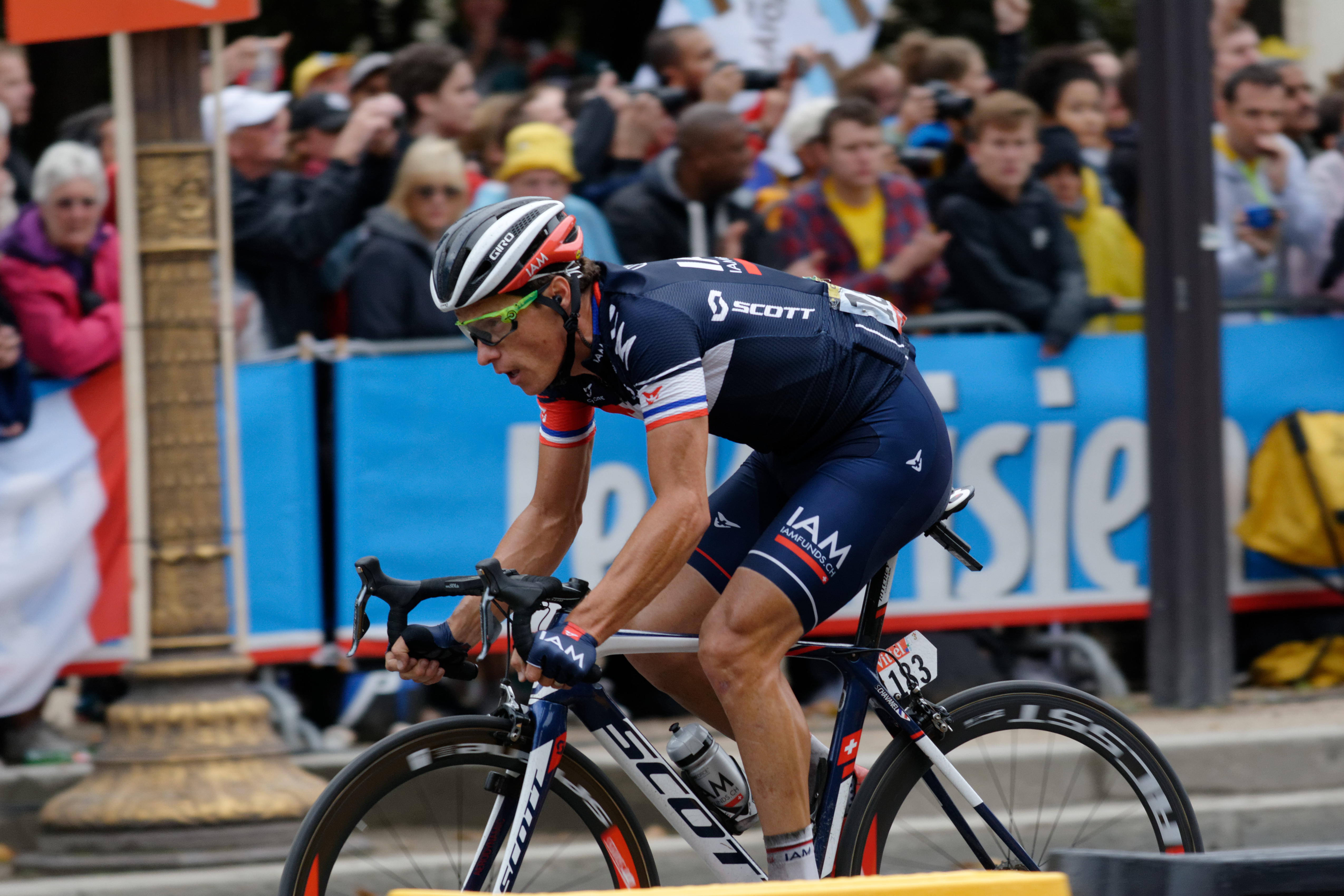 D71_2685_DxO